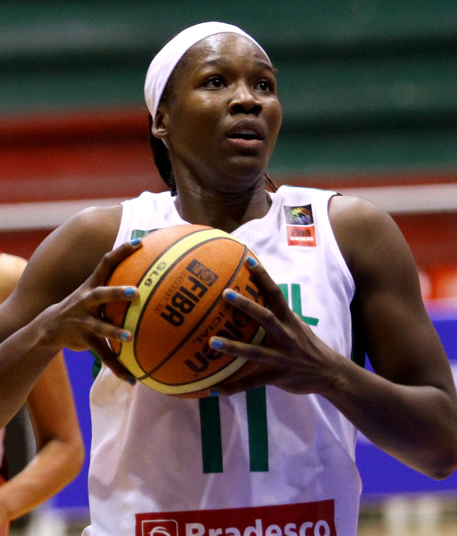 Ambato (Tungurahua) 14 de agosto de 2014 (Andes).- Inició el Campeonato Sudamericano de baloncesto Femenino Ambato 2014. Venezuela (blanco-vino) vs Brasil (blanco-verde).